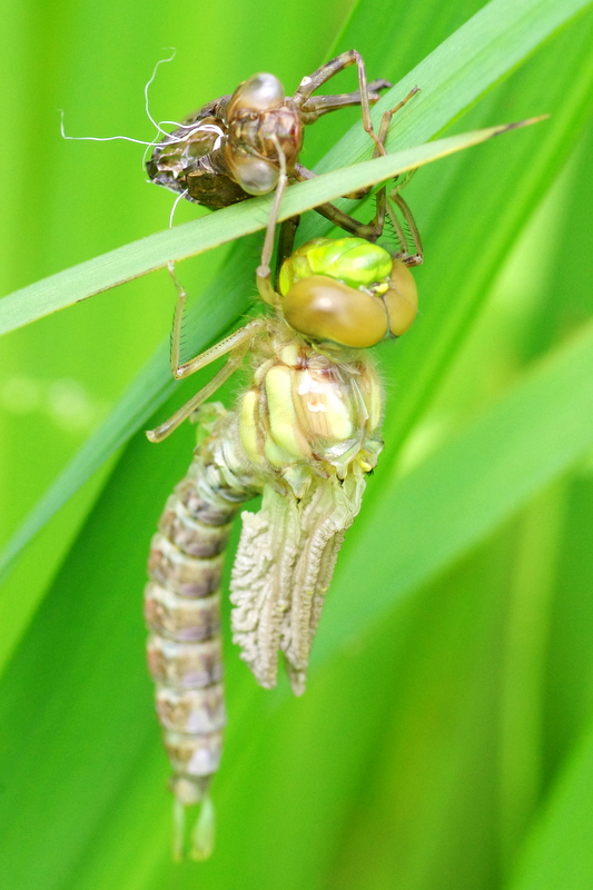 Żagnica sina (Aeshna cyanea) - przeobrażenie. Ważka chwyta odnóżami oskórek larwy (wylinkę) powyżej pęknięcia i wyginając się wyciąga odwłok.